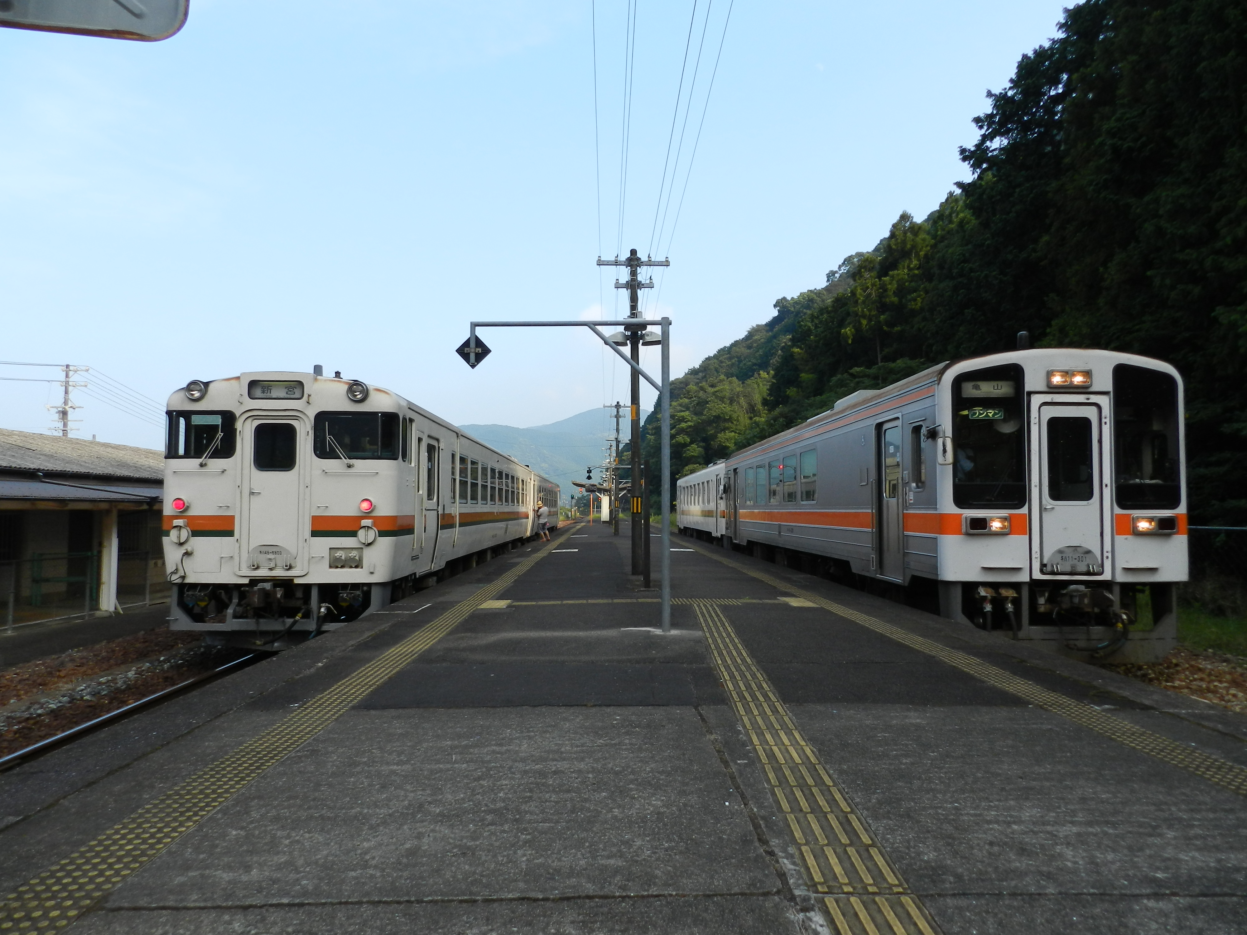 賀田駅で交換するキハ11系とキハ48系です。